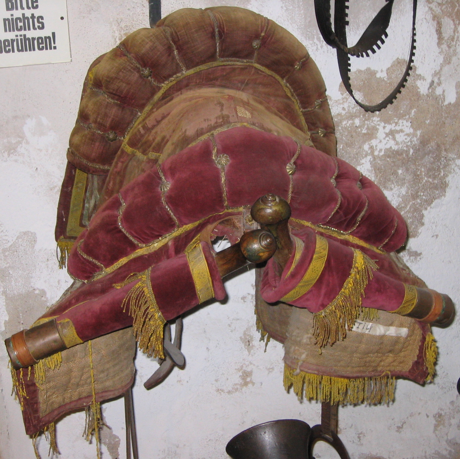 Offizierssattel aus dem Dreißigjährigen Krieg, aufgenommen im Historiengewölbe und Staatsverlies von Rothenburg ob der Tauber, Deutschland